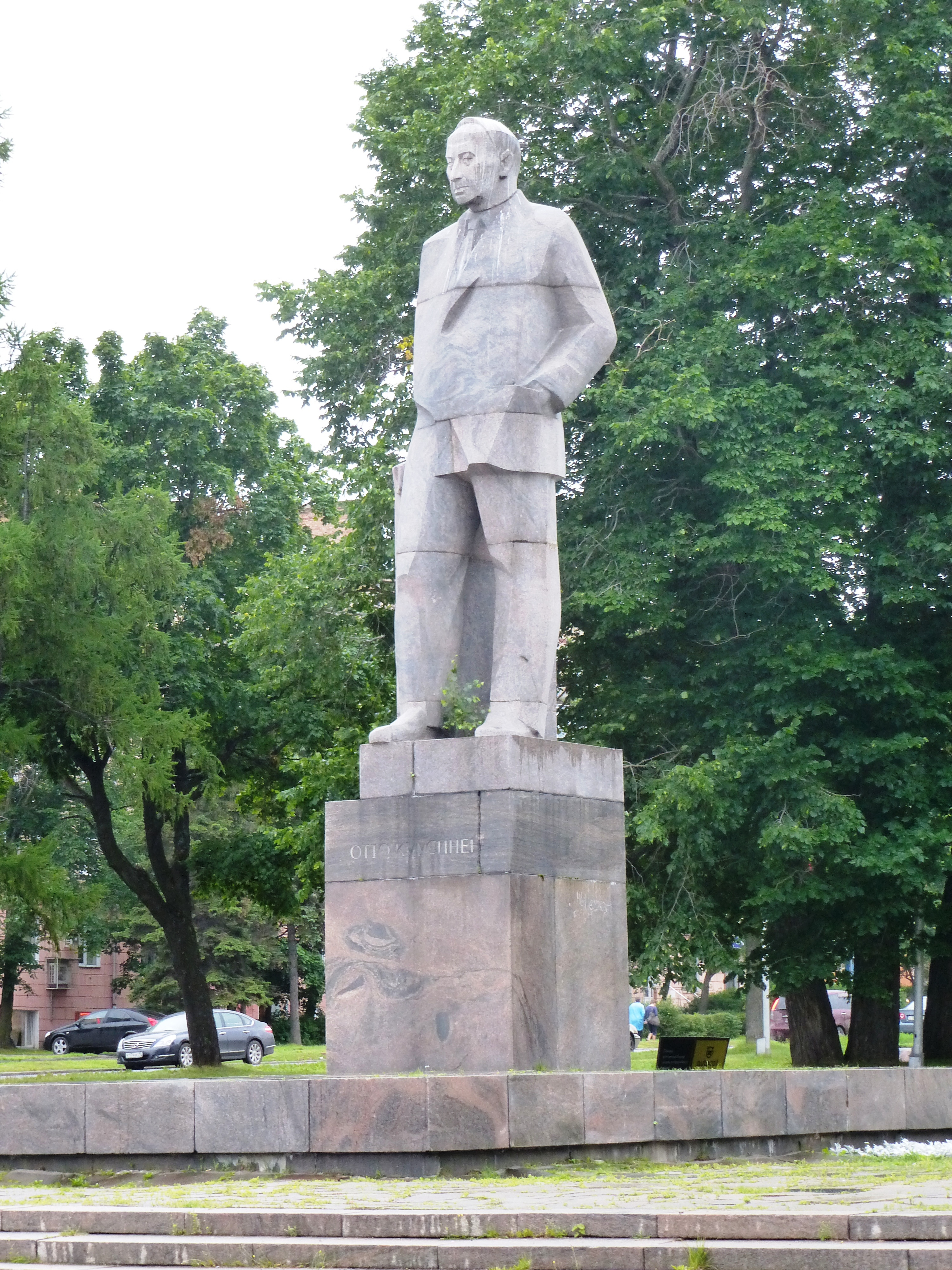 Памятник О.В.Куусинену в Петрозаводске. Открыт 22 июня 1973 года, скульптор Б.И.Дюжев.